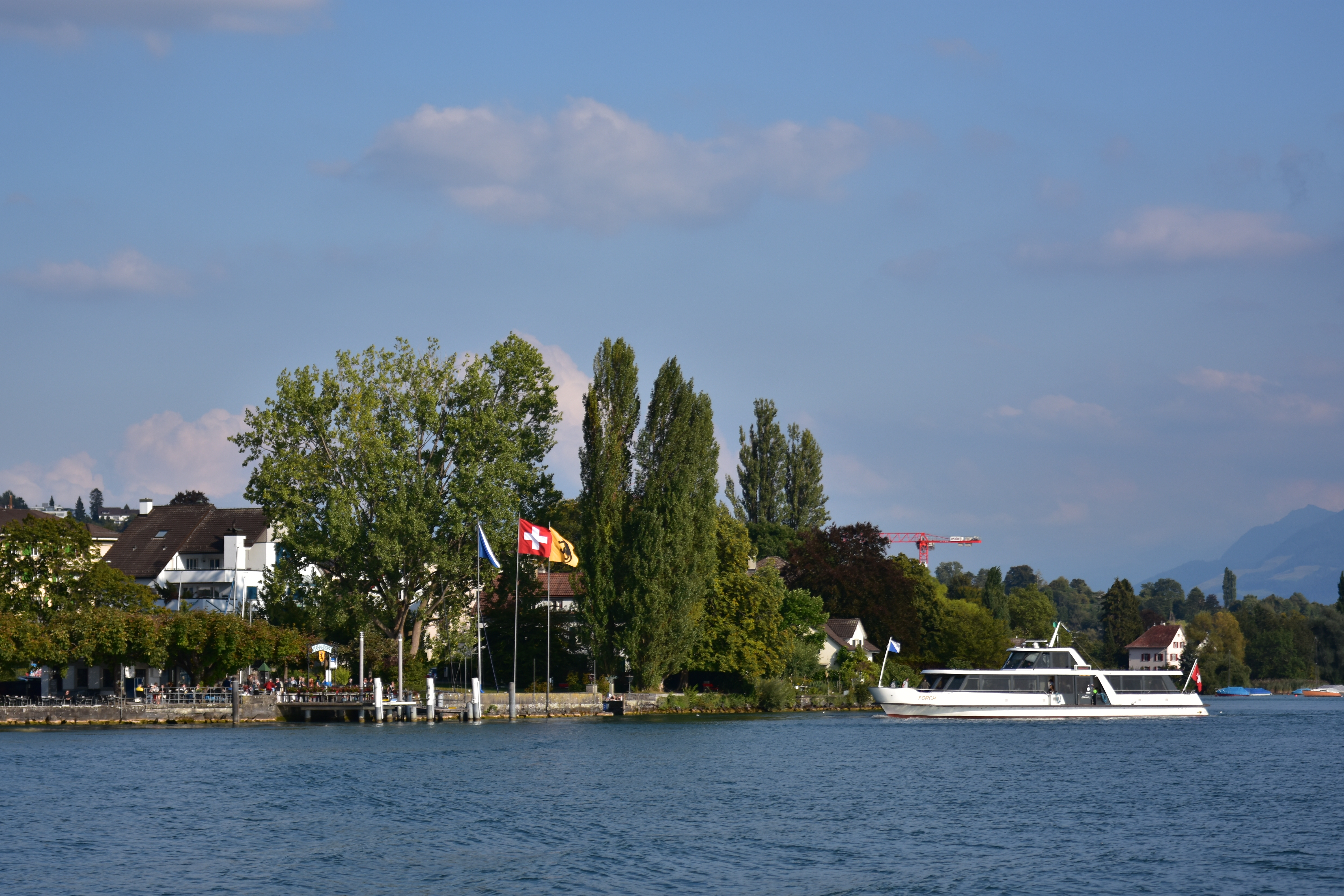 Männedorf and Pfannenstiel, as seen from ZSG ship MS Helvetia on Zürichsee in Switzerland